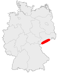 Lage des Erzgebirges in Deutschland Karte erstellt auf der Grundlage der opengeodb.de-Umrisse - GNU-FDL